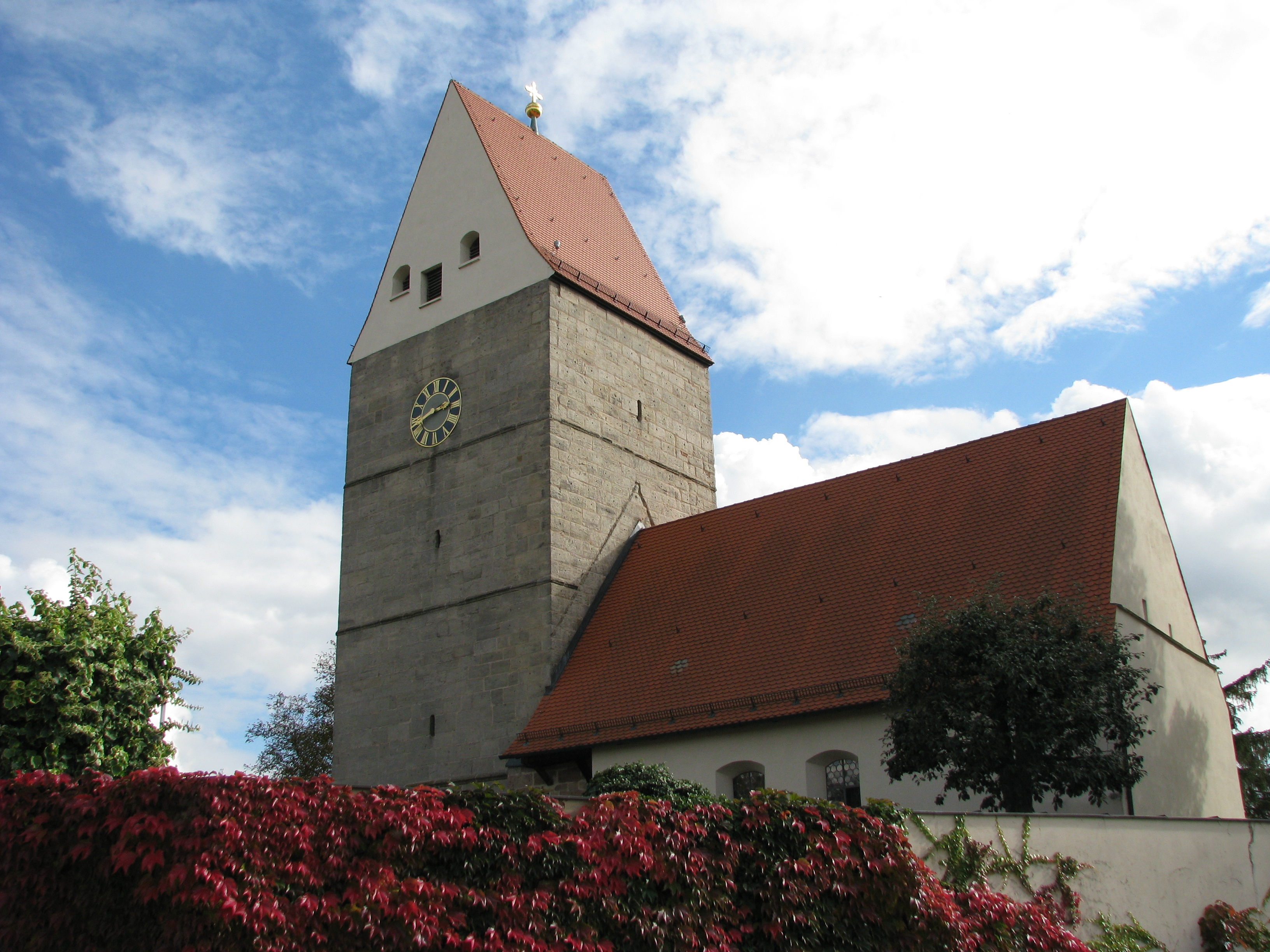 Selingstadt, Gemeindeteil der Stadt Heideck im mittelfränkischen Landkreis Roth, Ortskirche St. Georg